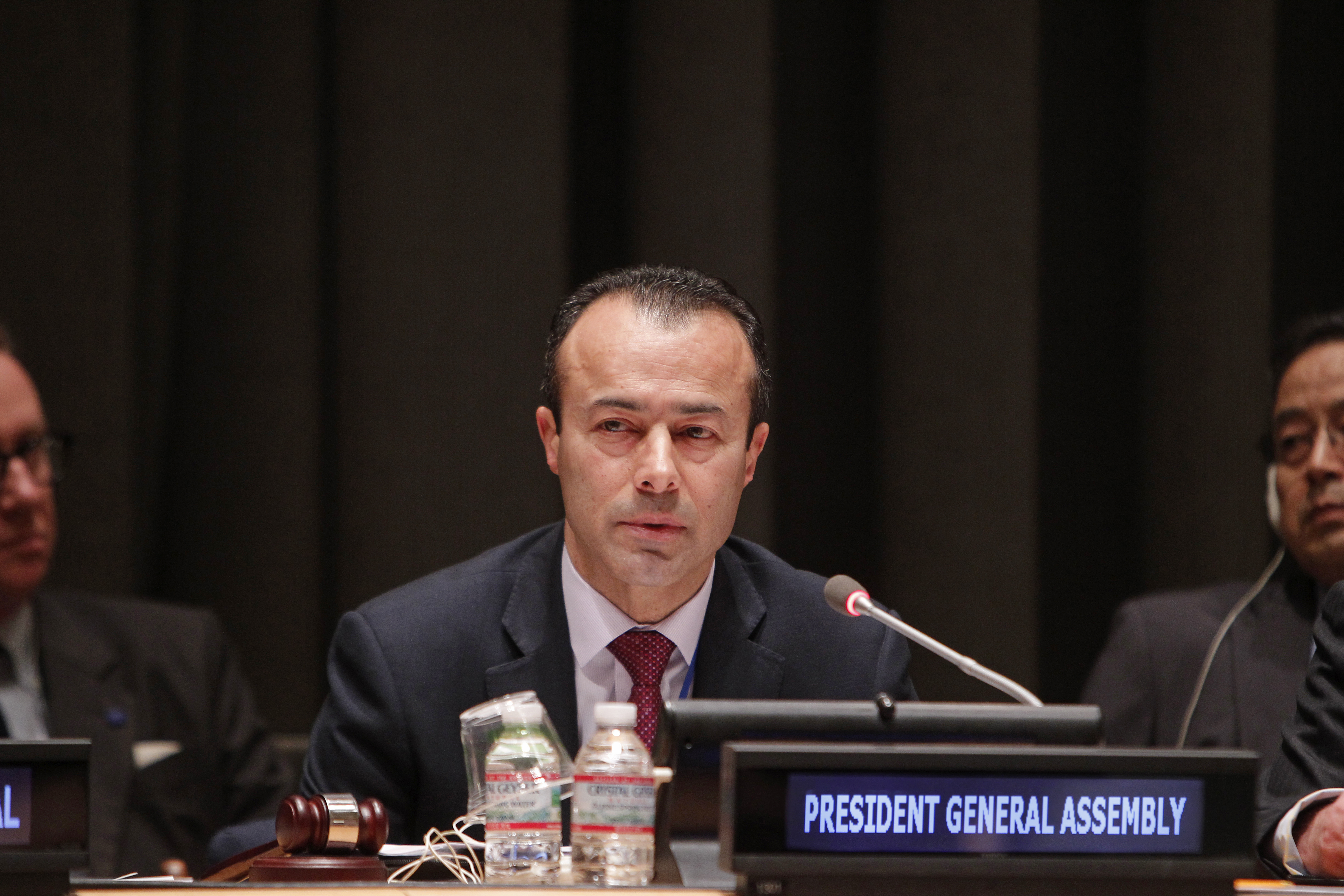 New York, Estados Unidos, 5 de mayo de 2014 - La Secretaría de Cultura participa de las jornadas de Naciones Unidas "Cultura y Desarrollo Sustentable". En representación de la Argentina, la directora nacional de Política Cultural y Cooperación Internacional, Mónica Guariglio, es oradora de la sesión temática de Naciones Unidas, que se desarrolla en Nueva York hasta el 9 de mayo. En la foto: Mohamed Khaled Khiari, Presidente actuante de la Asamblea General de la ONU. Foto: ONU